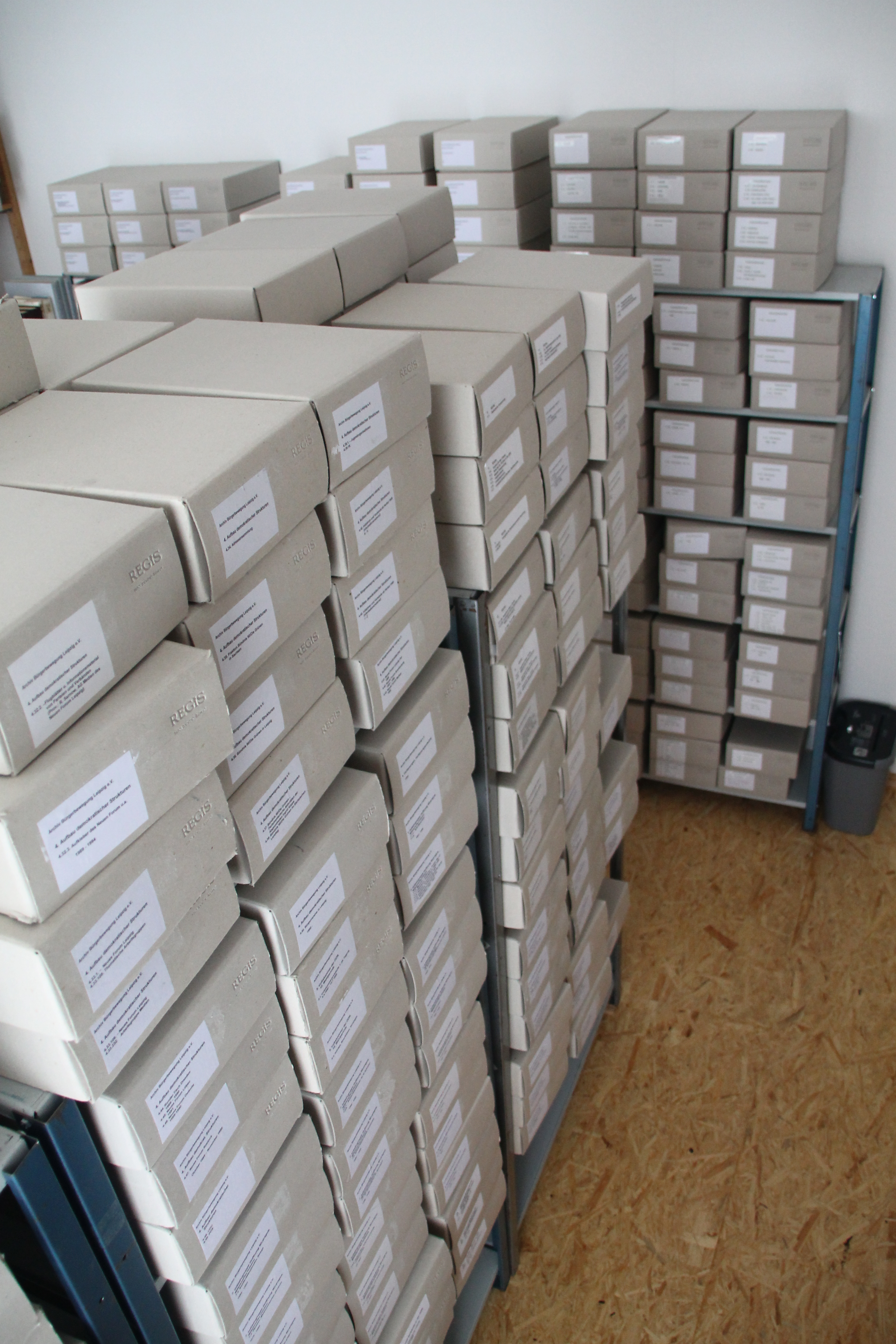 Archivraum des Archivs Bürgerbewegung e.V.